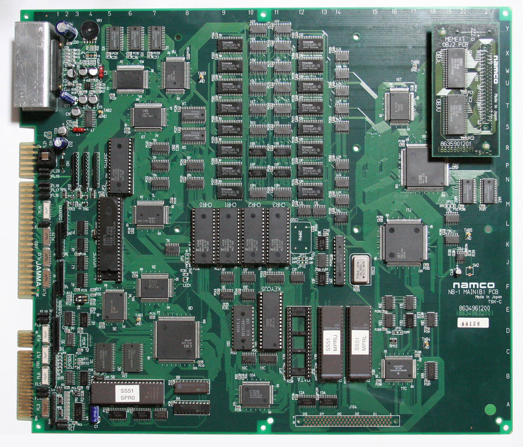 NAMCO NB-1 MAIN(B) PCB+MEMEXT OBJ2 PCB